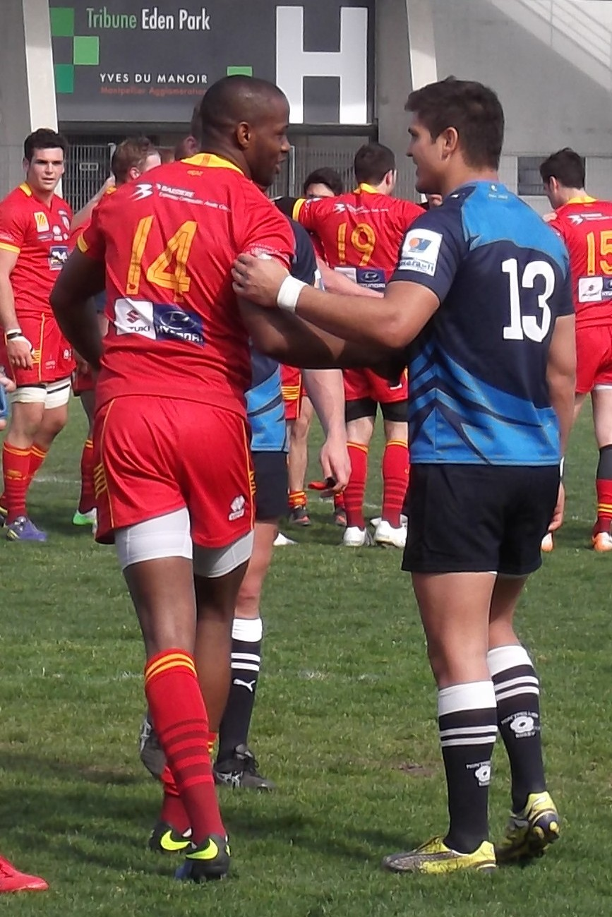 Wandile Mjekevu (USAP, 14) et JP Du Plessis (Montpellier HR, 13), 6 avril 2014.